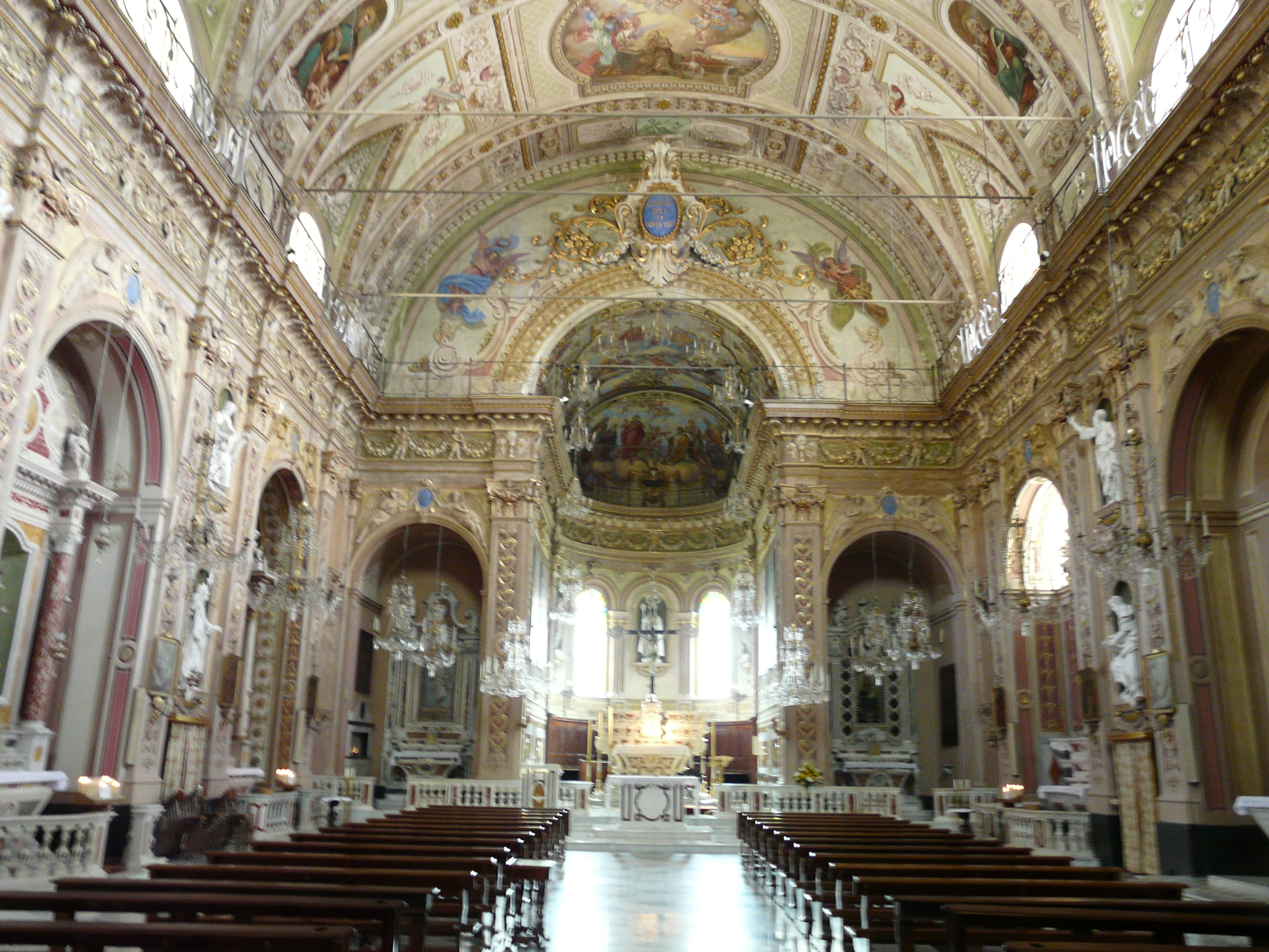 Chiesa di Sant'Ambrogio, Uscio, Liguria, Italia